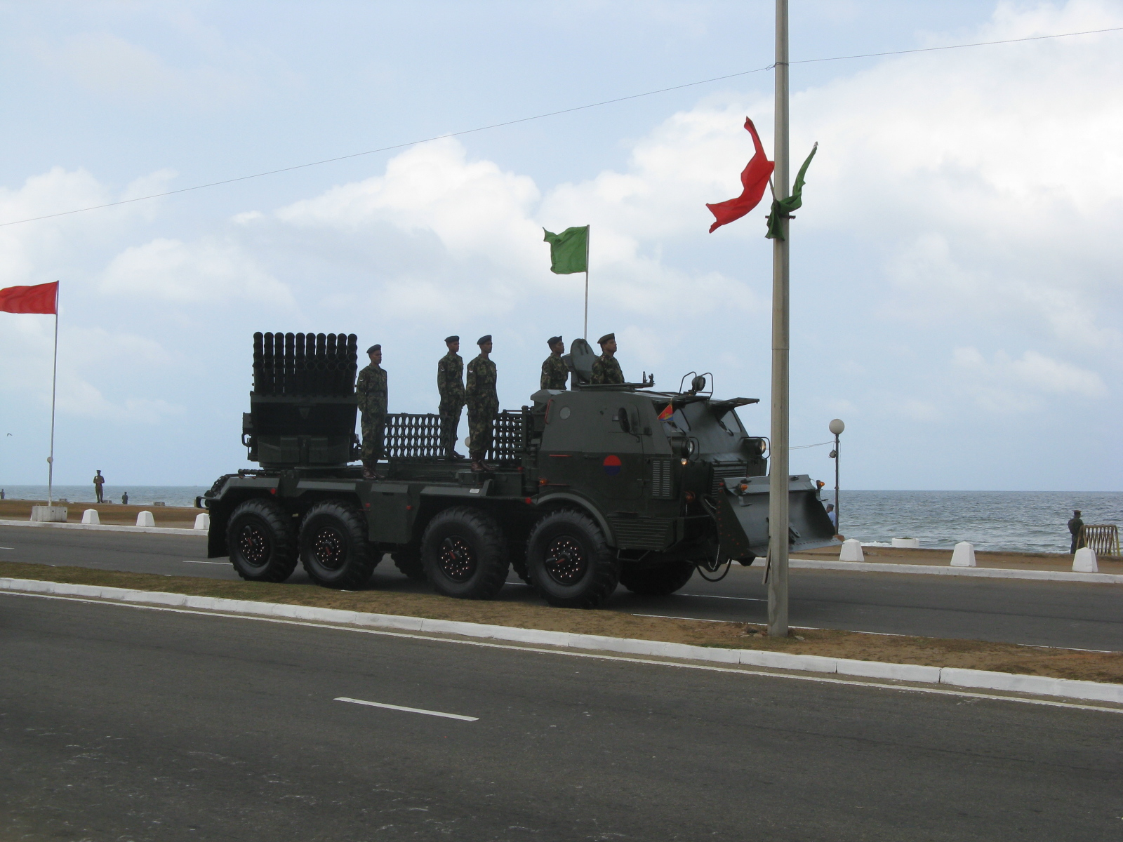 RM-70 Multi Barrel Rocket Launcher - Sri Lanka Army